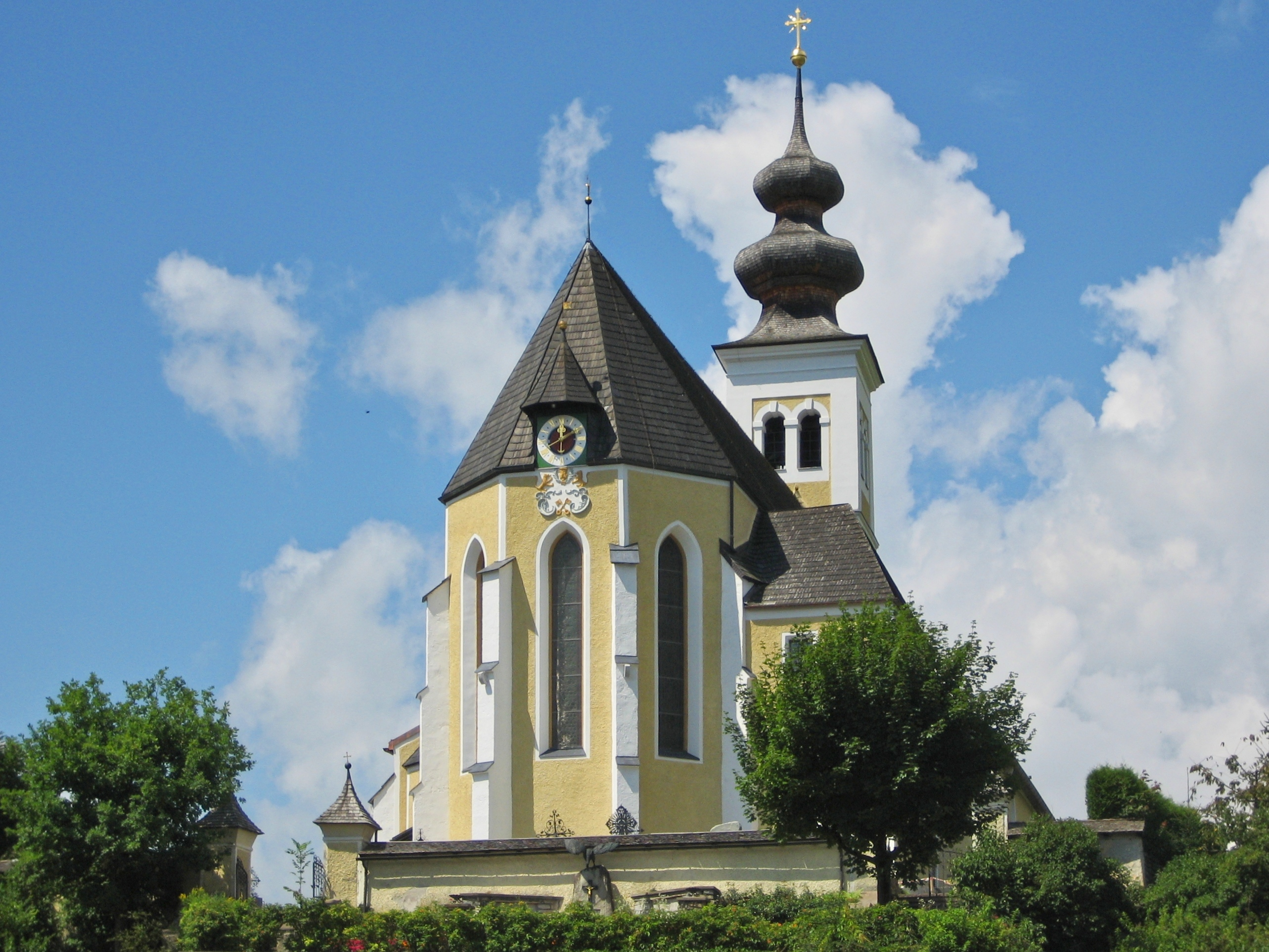 Kath. Pfarrkirche hl. Vitus in Sankt Veit im Pongau